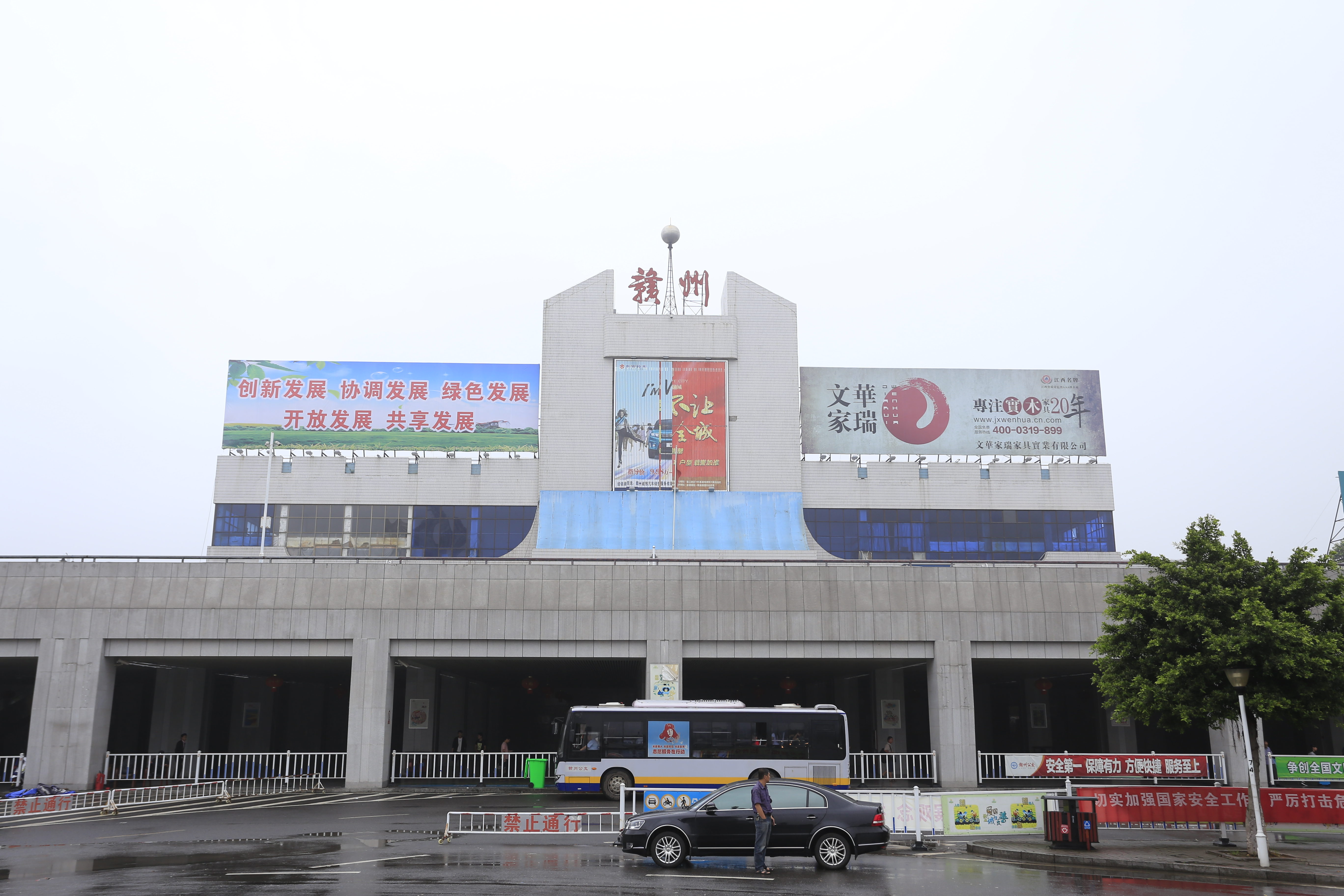 赣州火车站